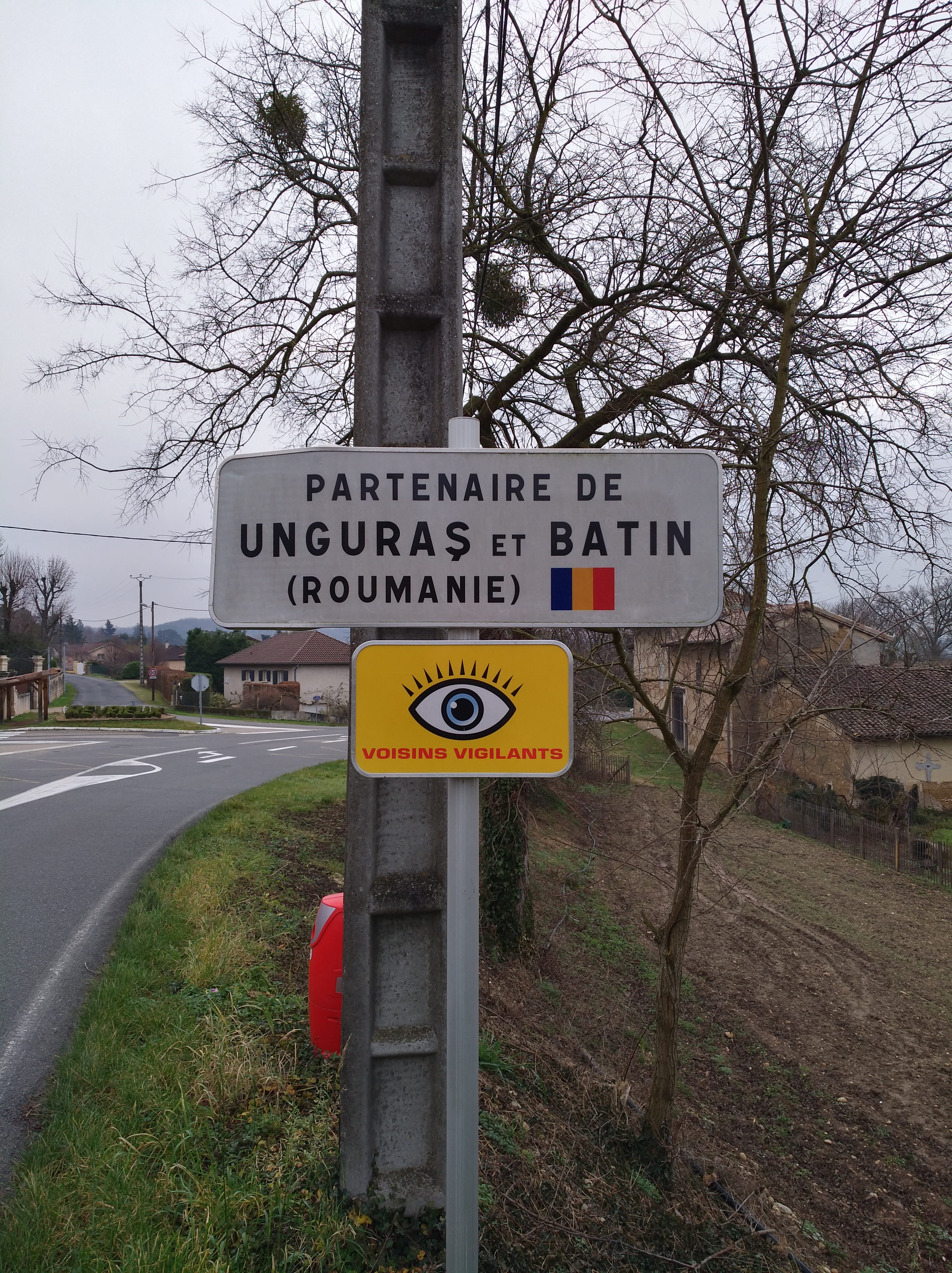 Panneaux indiquant un partenariat avec deux communes roumaines, des voisins vigilants et une borne d'incendie rouge, à Reyrieux (Ain, France).